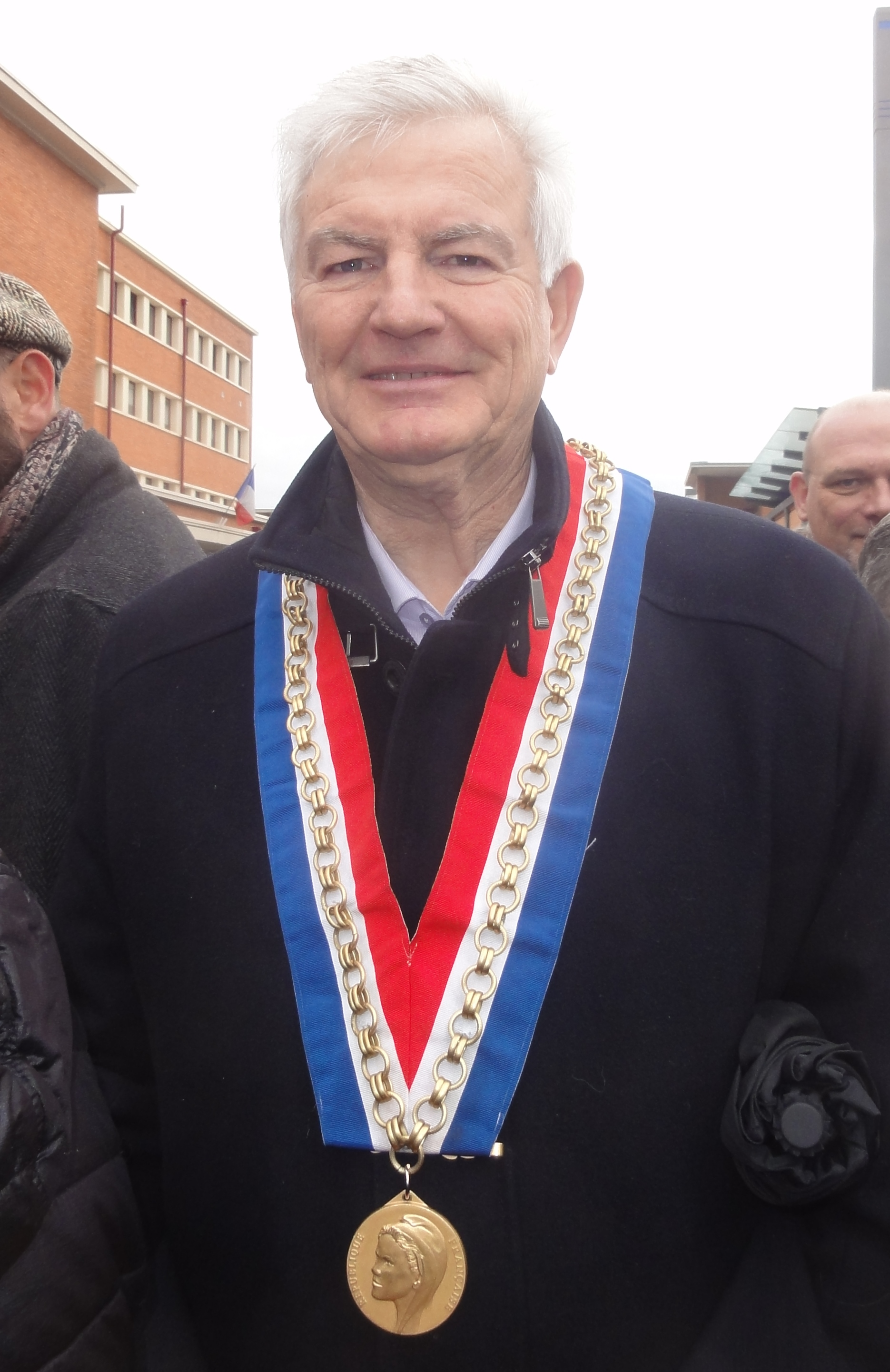 Manifestation contre la suppression des dessertes TGV en gare de Douai le 2 mars 2019. Depicted place: Douai railway station Depicted person: Martial Vandewoestyne – French politician